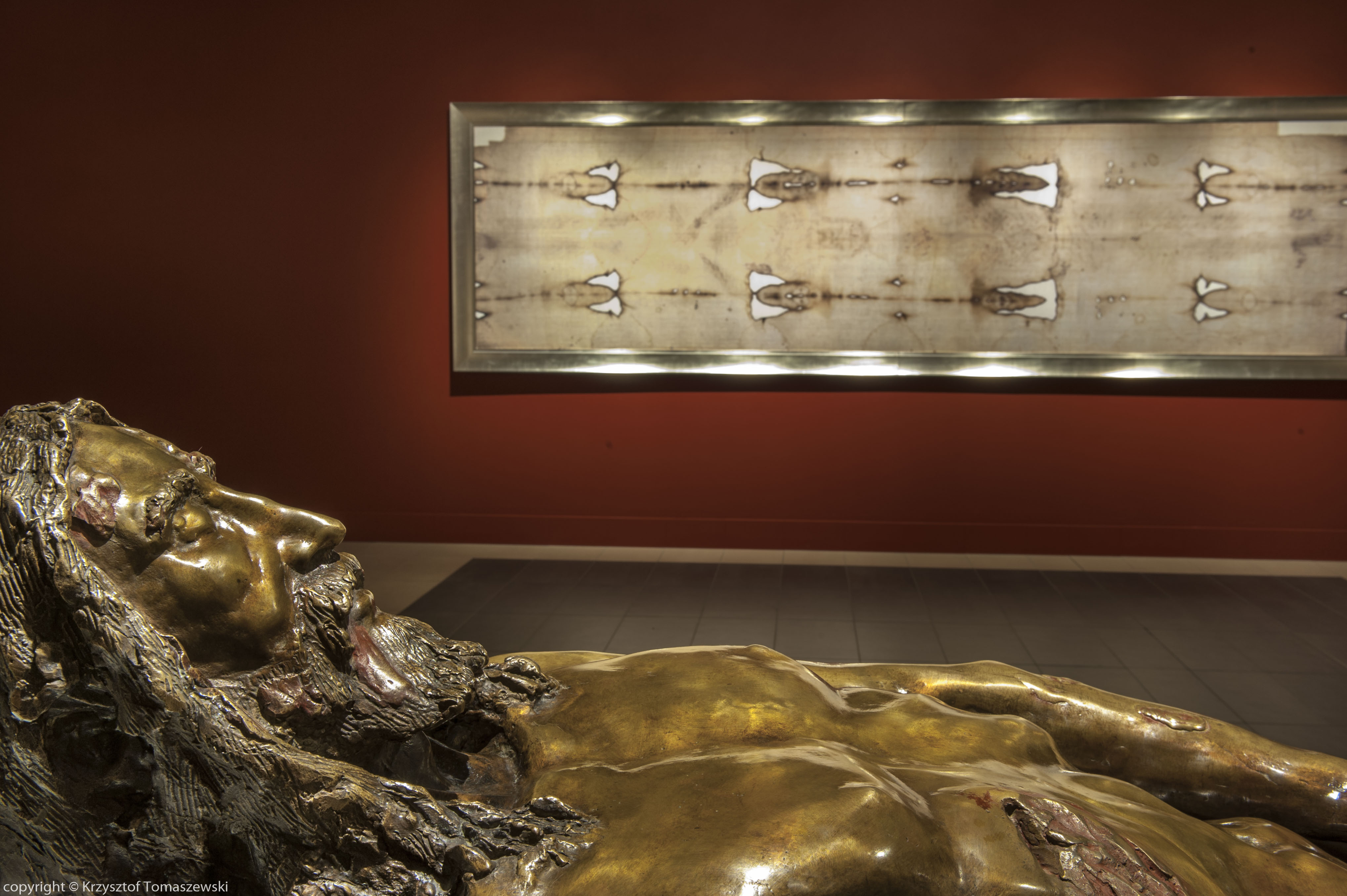 Na zdjęciu kopia Całunu Turyńskiego oraz fragment posągu Chrystusa - rzeźby wykonanej na podstawie wizerunku odbitego na płótnie.